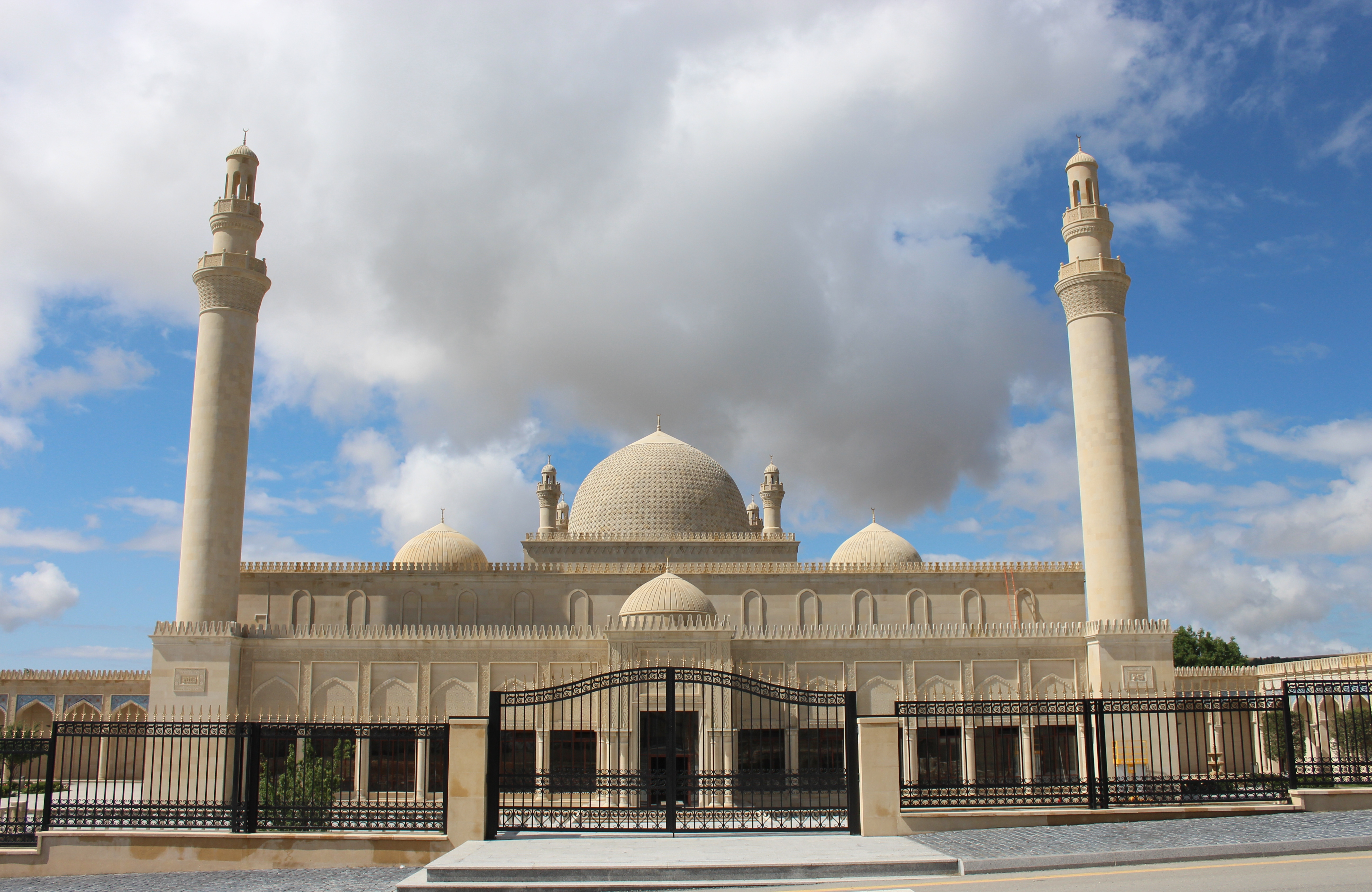 Qoşa minarəli məscid. Şamaxı şəhəri